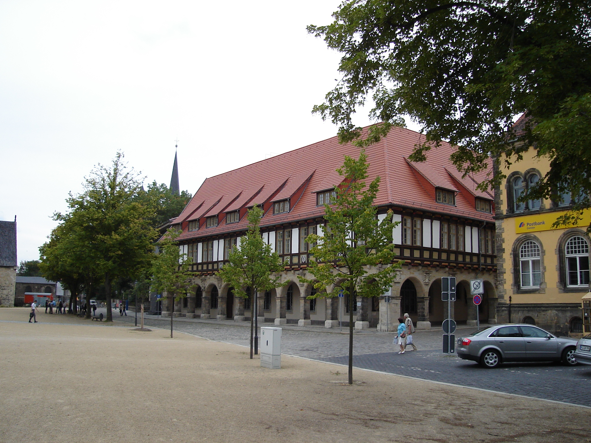 Halberstadt, Gebäude am Domplatz